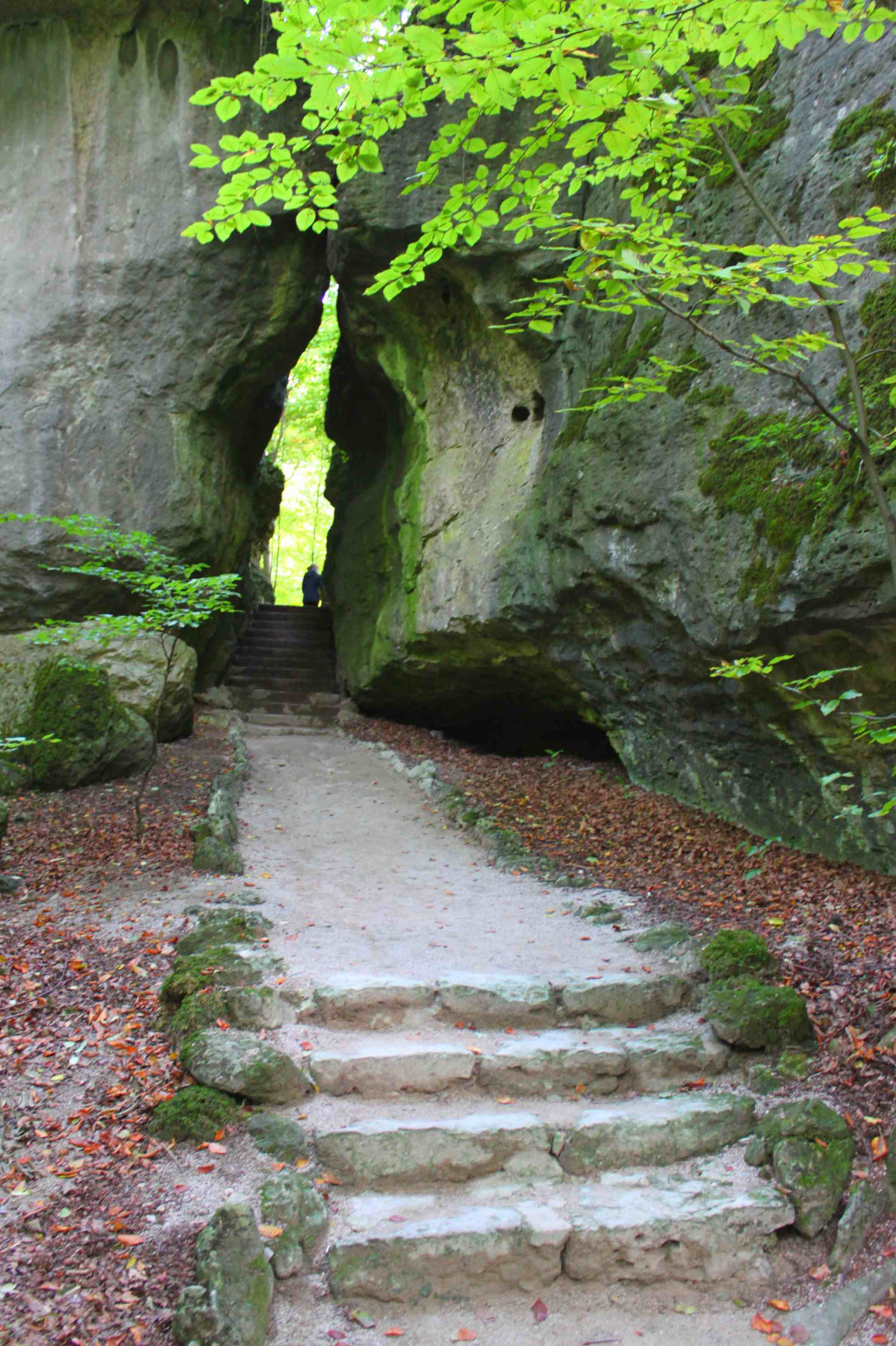 Gespaltener Fels im Park von Sanspareil